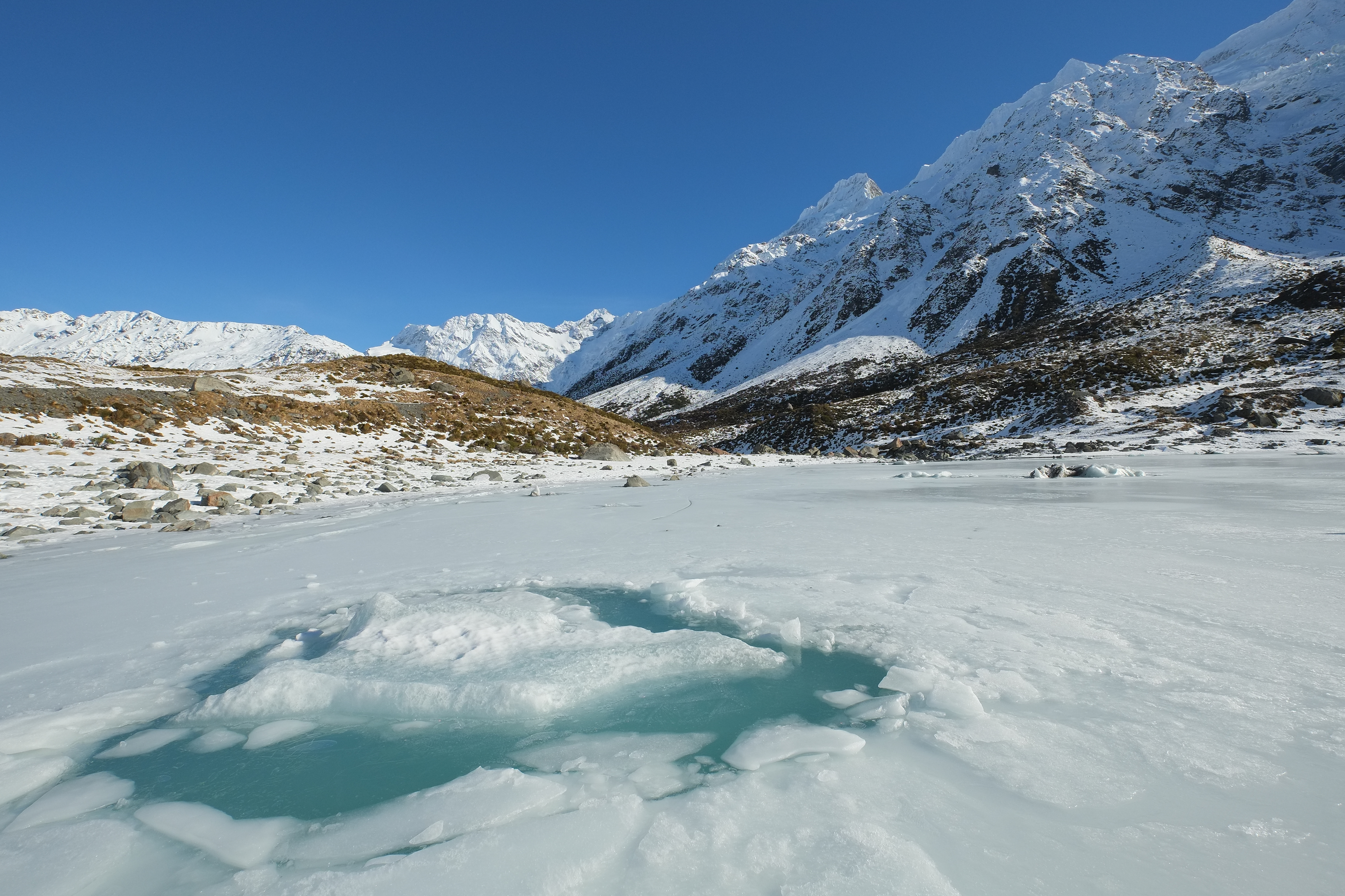 Broken ice on frozen Hooker Glacier Lake in winter